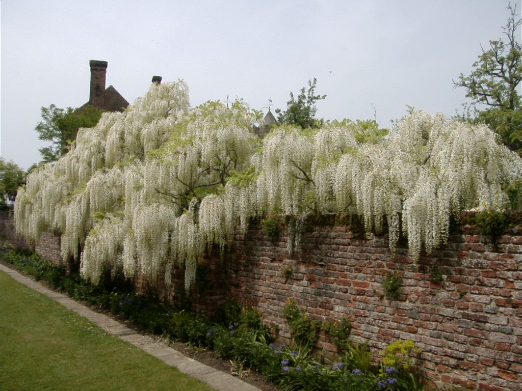 Beschreibung: Sissinghurst Castle Garden - Der Grabengang mit Ziegelsteinwand und Wisteria Quelle: eigene Fotografie Datum: Mai 2004 Fotograf: OdI andere Versionen: keine